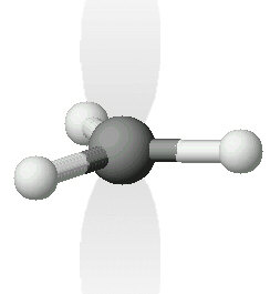 modello del radicale metilico, disegnato da --Paginazero 09:10, Set 5, 2004 (UTC)